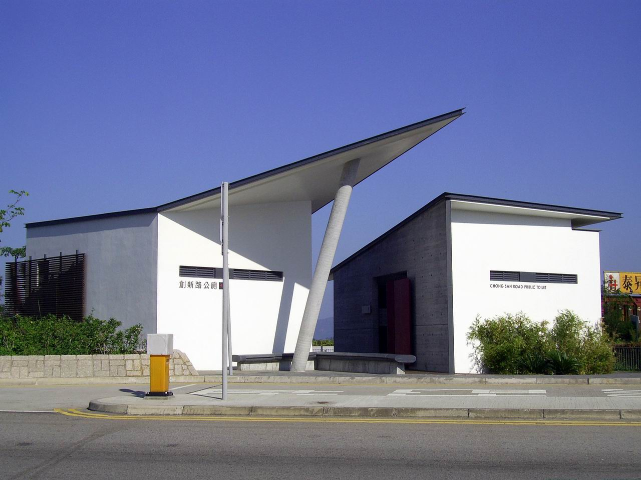 中文（香港）: 創新路公廁